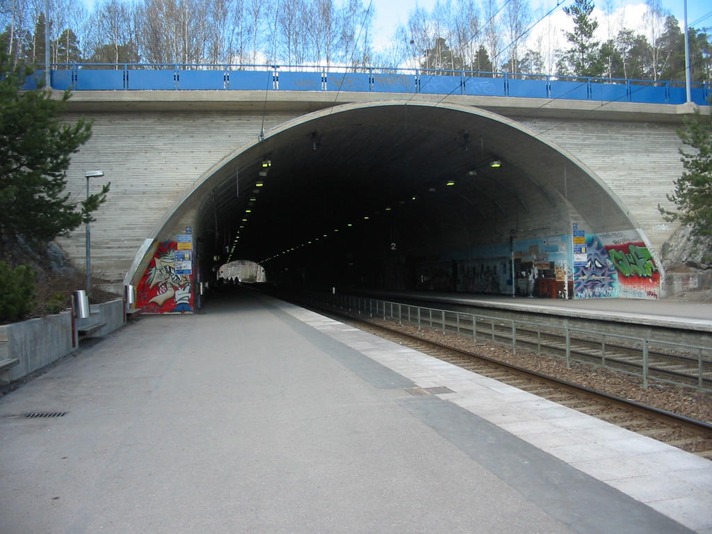 Malminkartano train station